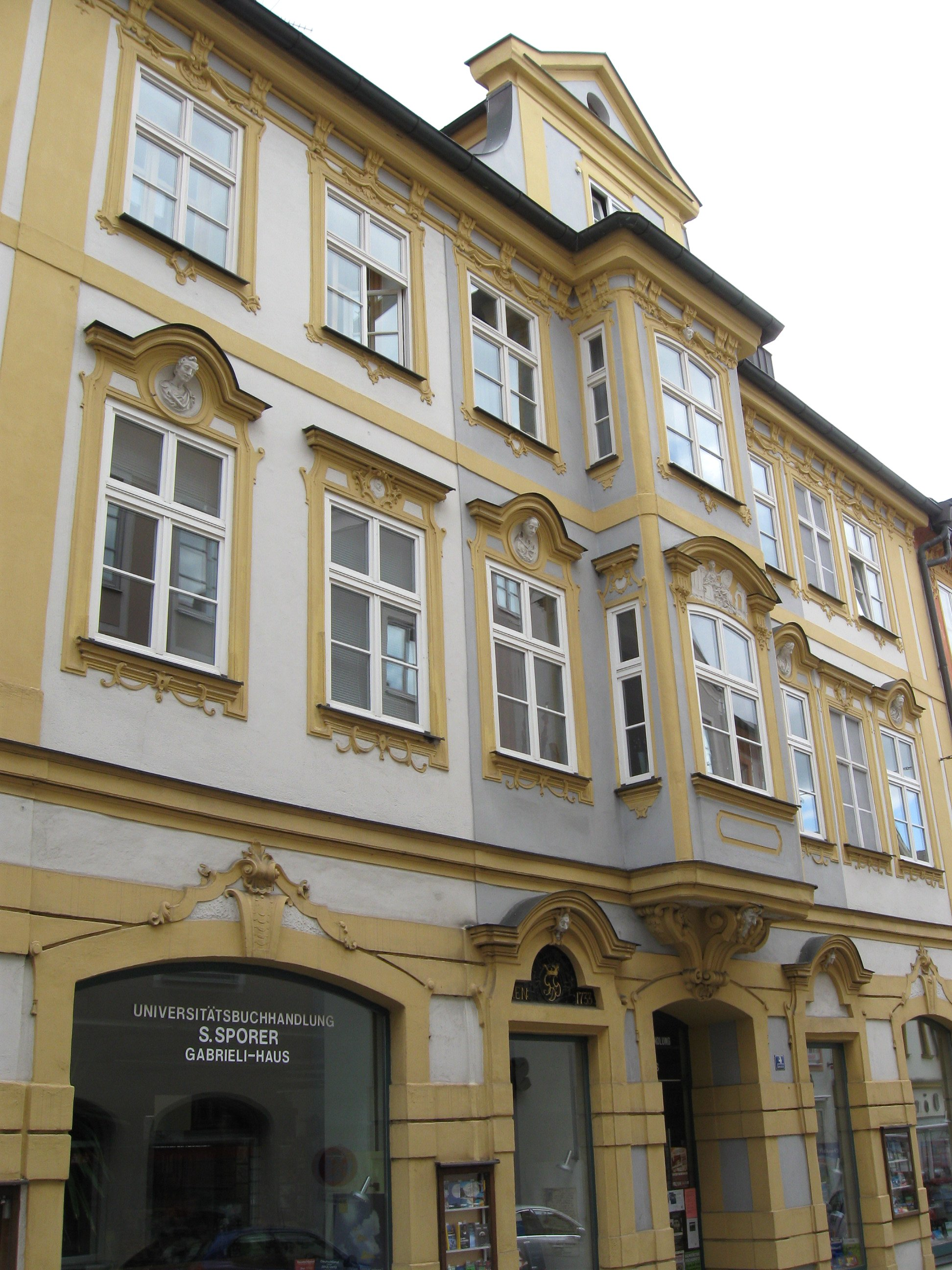 Gabrielistraße 4; Marktgasse 3; Wohnhaus Gabriel de Gabrielis, 1686 erbaut, dreigeschossig, mittig mit zweigeschossigem Erker und Zwerchhaus, barocke Fassadengestaltung von Gabriel de Gabrieli 1733. D-1-76-123-74